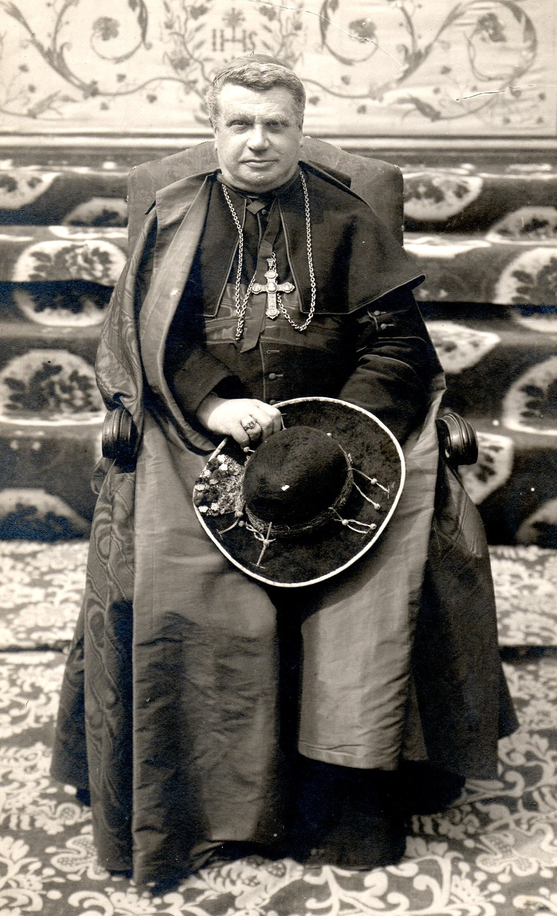 Foto scattata al Collegio Sant'Arcangelo (Fano) in occasione del Congresso Eucaristico.